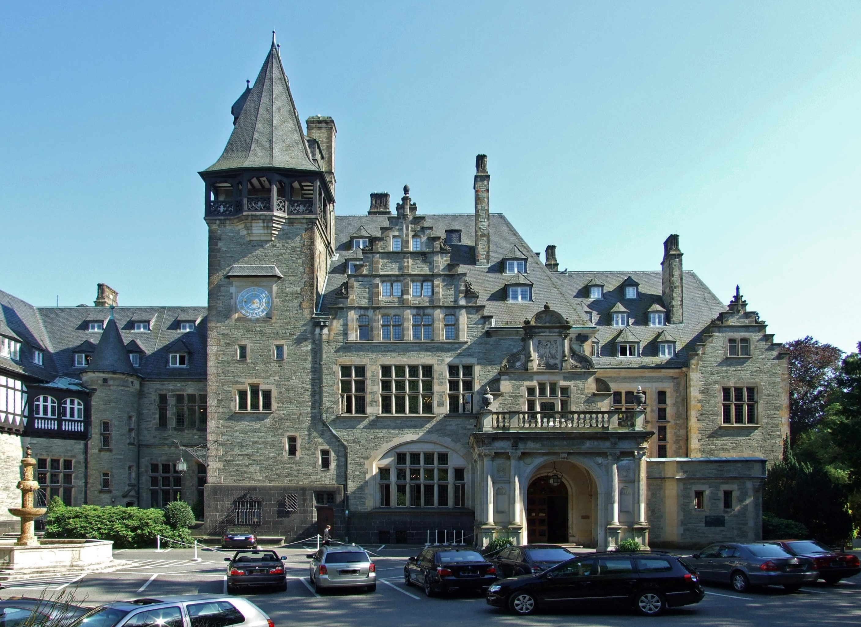 Schloss Friedrichshof im Kronberger Schlosspark